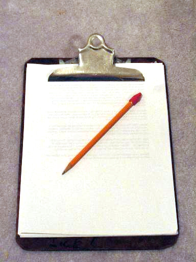 A clipboard